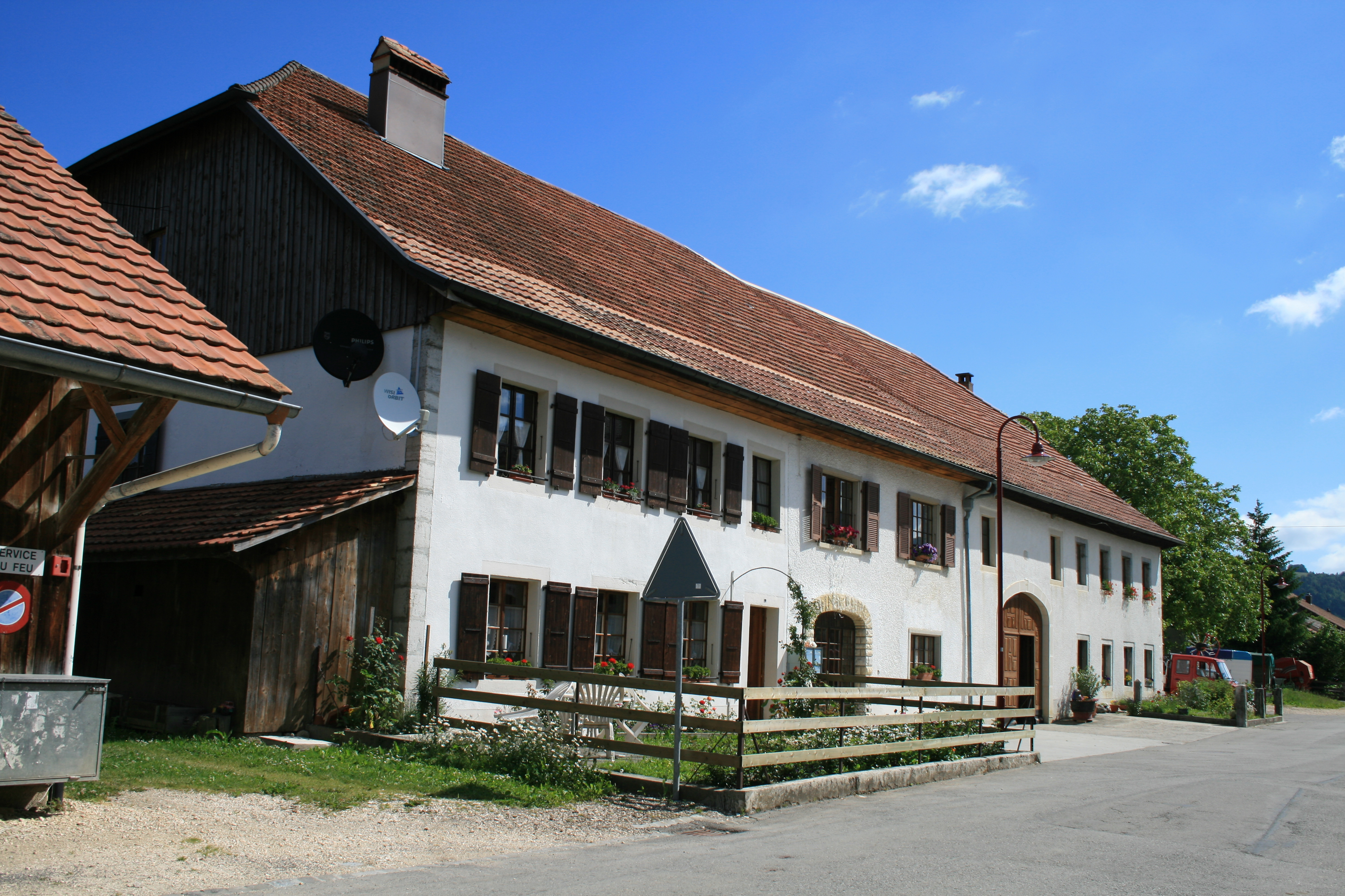 Sornetan BE, Schweiz